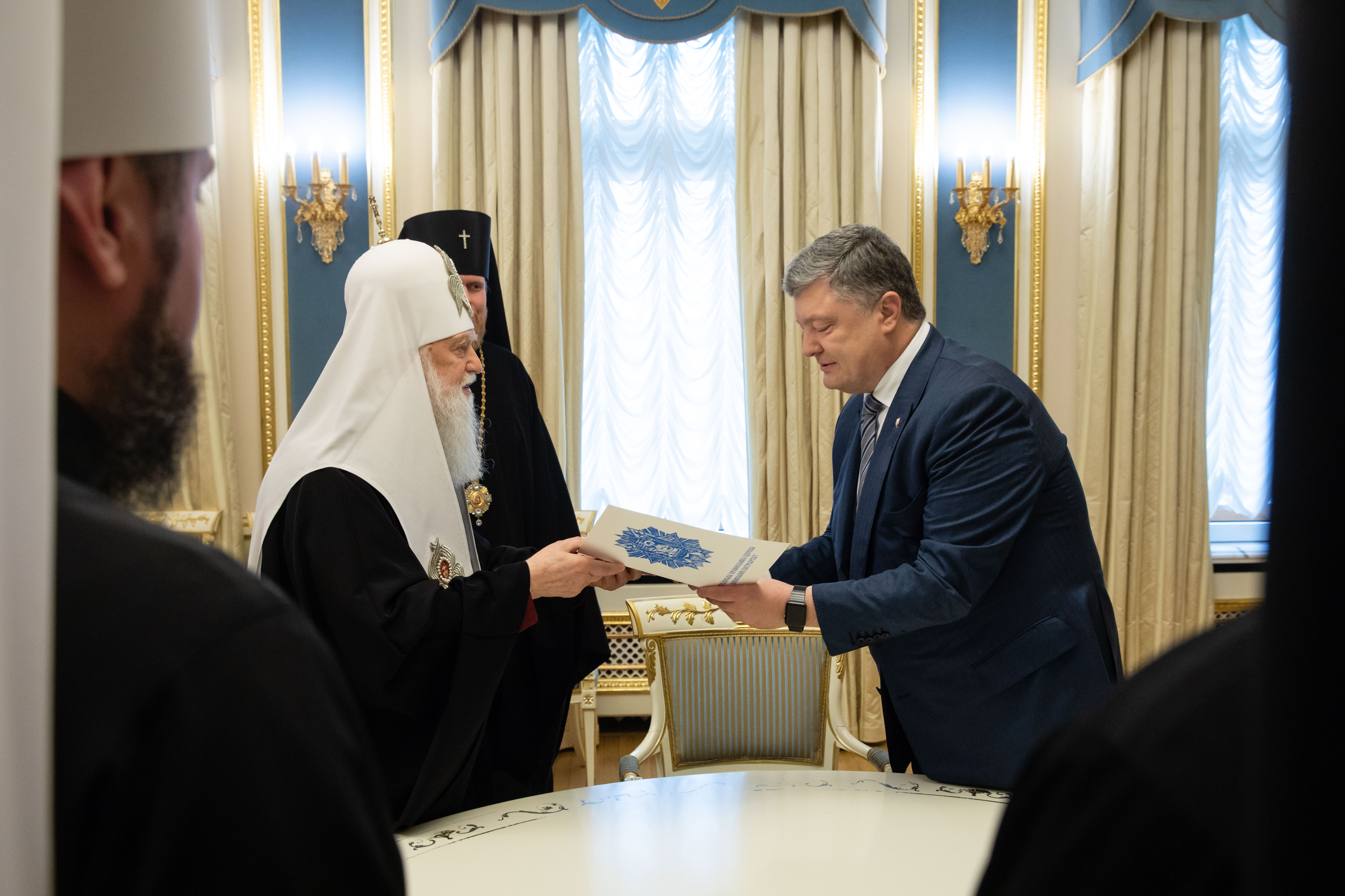 Президент Петро Порошенко провів зустріч з Предстоятелями православних церков України та офіційно прийняв Звернення для передачі Вселенському Патріарху Варфоломію про надання українській церкві Томосу про автокефалію з підписами усіх архієреїв, які підтримали це рішення. На фото Президент та патріарх Філарет